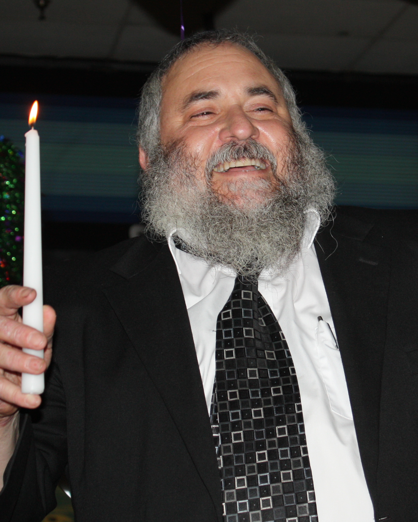 Yisroel Goldstein